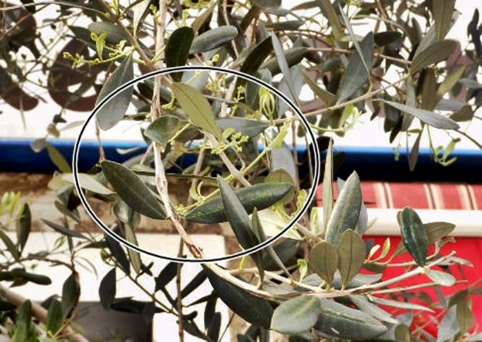 Olea europea europea europea cultivar Salonenque inflorescence axilliaire (Montpellier, 01/05/2013 rue de Claret